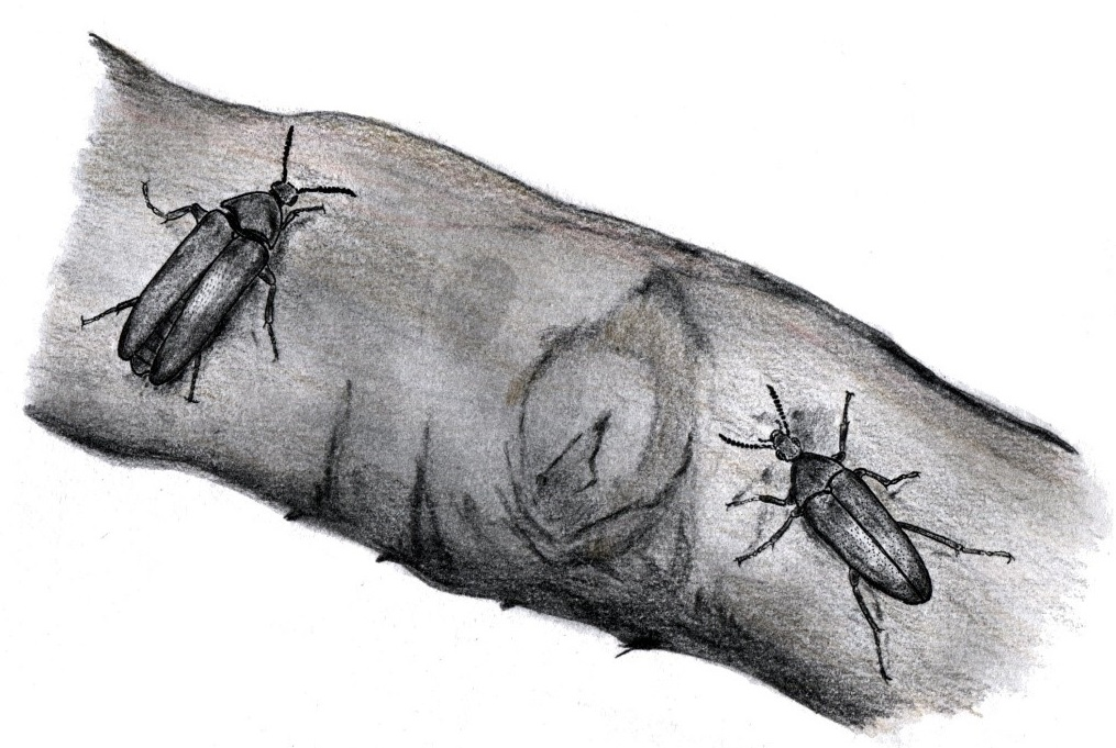 中文（台灣）: 媧皇始源大花蚤